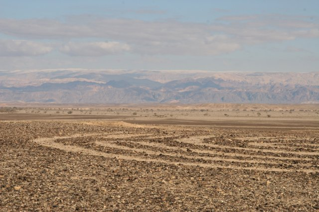 המדבר באשרם